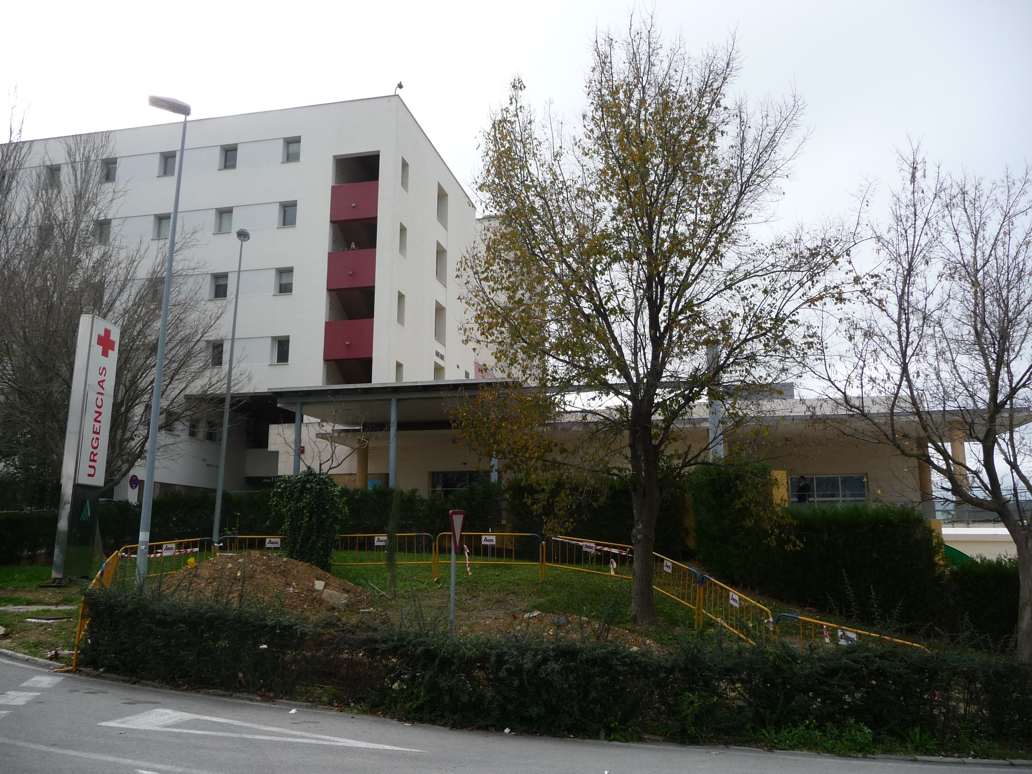 Hospital de Jerez de la Frontera (Andalucía, España)